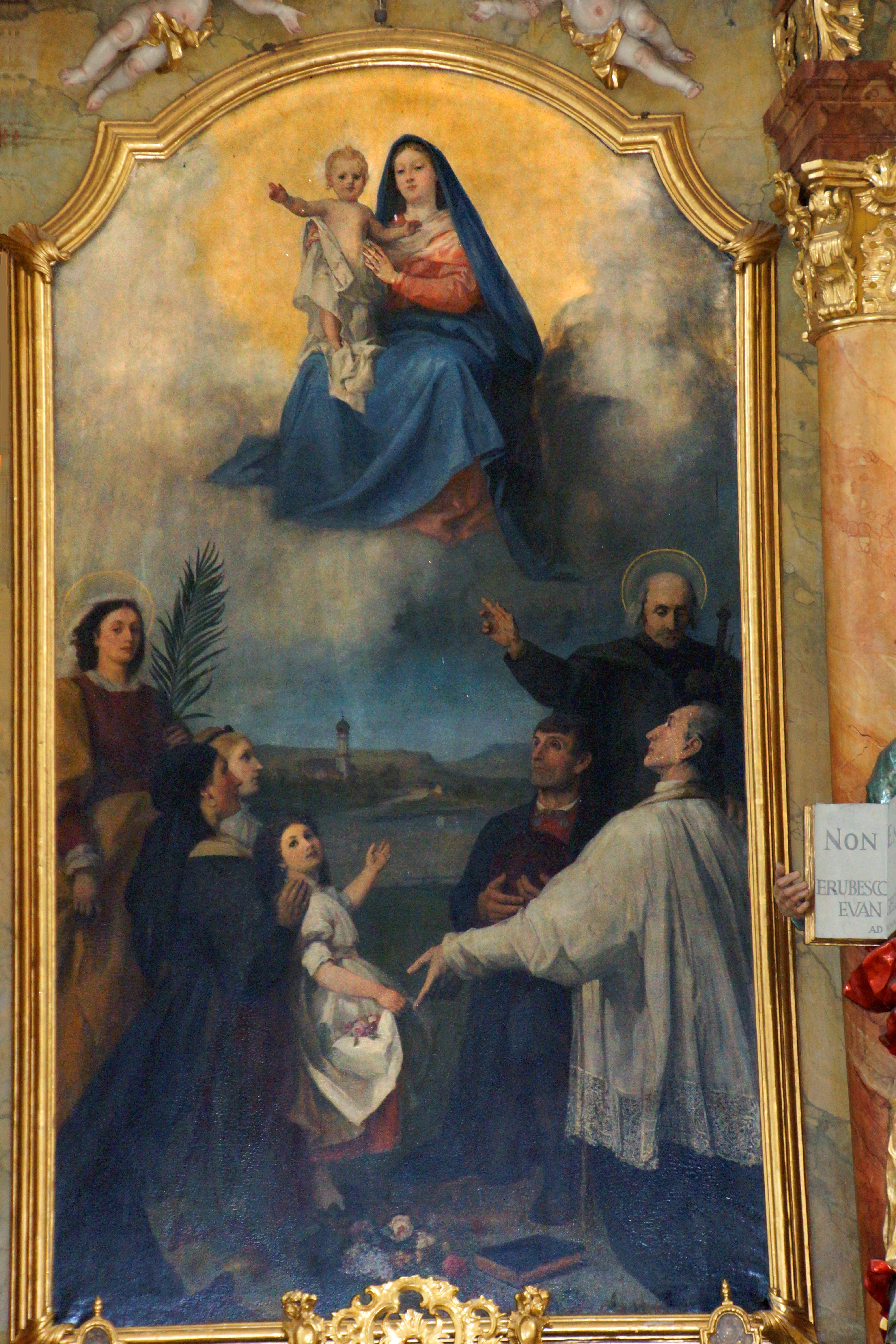 Die katholische Pfarrkirche Mariä Opferung in Duggendorf bei Regensburg